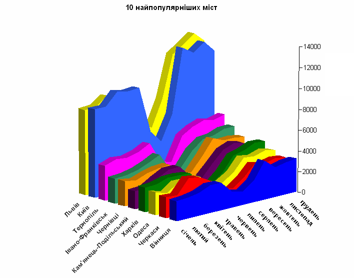 Статистика відвідуваності статей Української вікіпедії про українські міста, 2010 рік. 10 найпопулярніших.